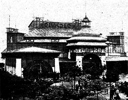 Divadlo Uranie v Holešovicích